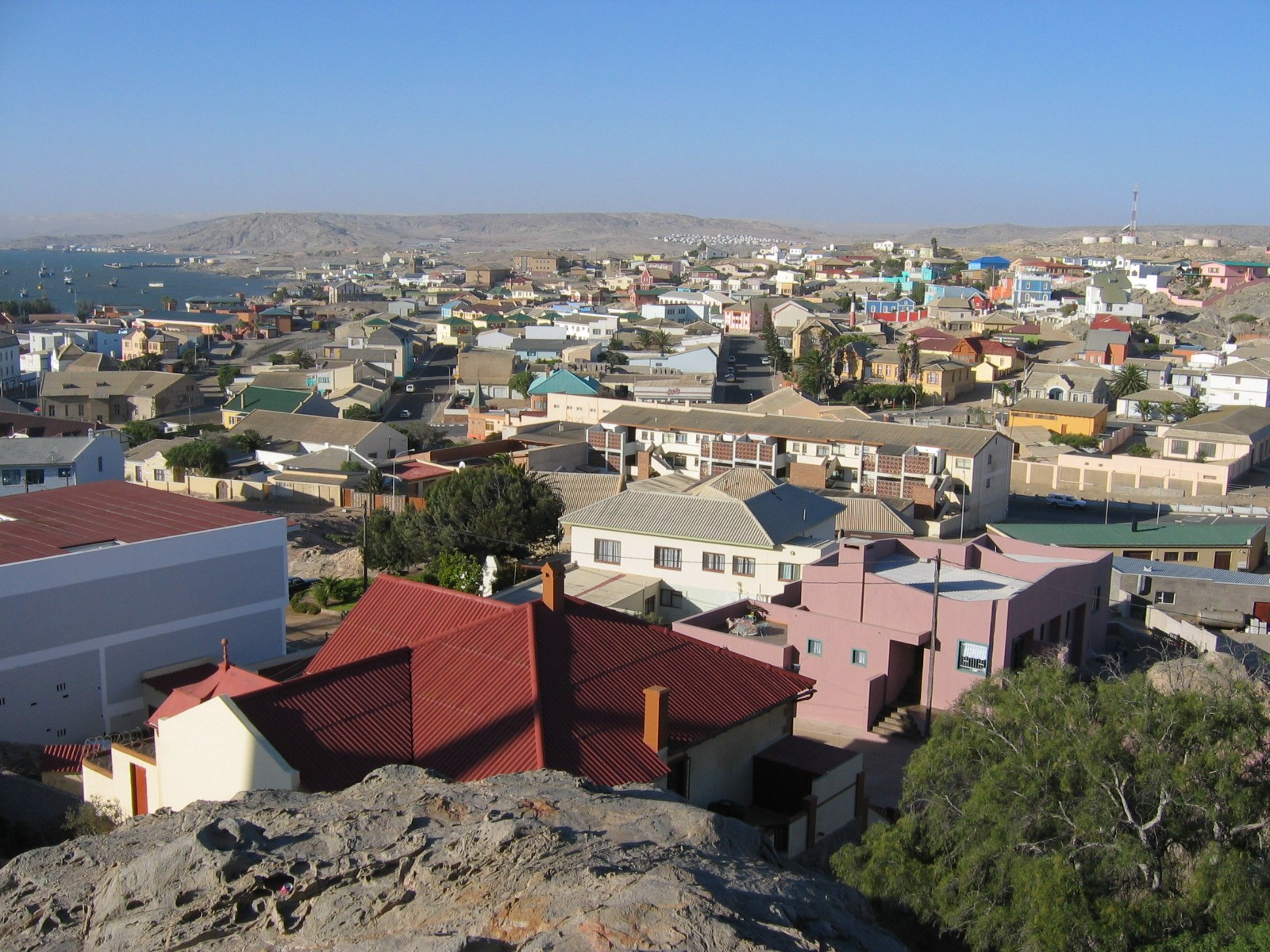 Blick auf Lüderitz von der Felsenkirche, Namibia